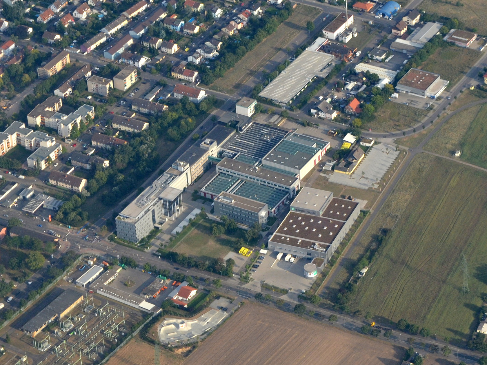 Luftbild vom Unternehmen Pepperl+Fuchs GmbH mit Sitz in Mannheim